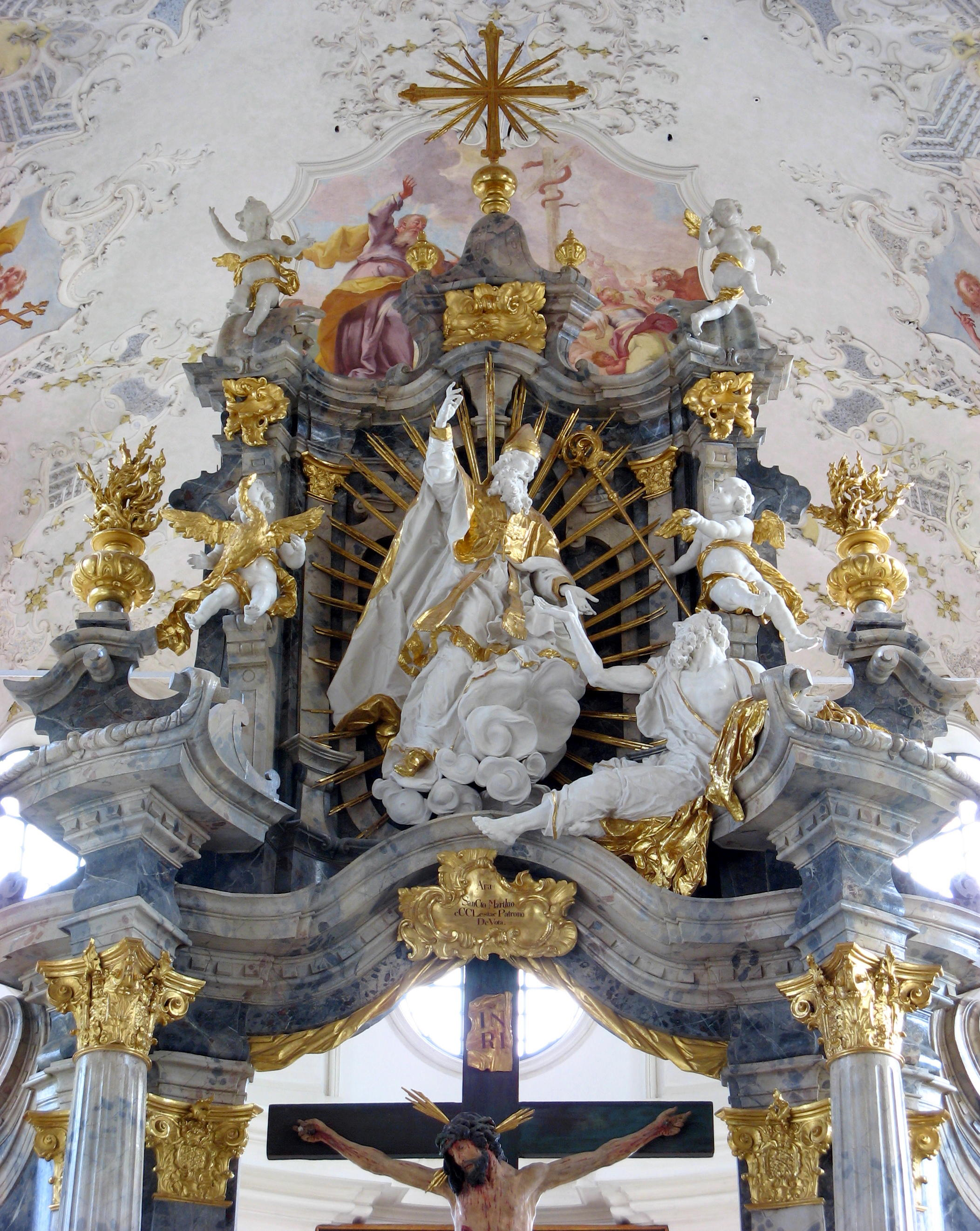 Auszug des Hochaltars in St. Martin, Marktoberdorf, von Joseph Stapf, Pfronten, 1745